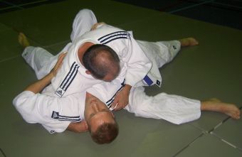 kuzure kesa gatame